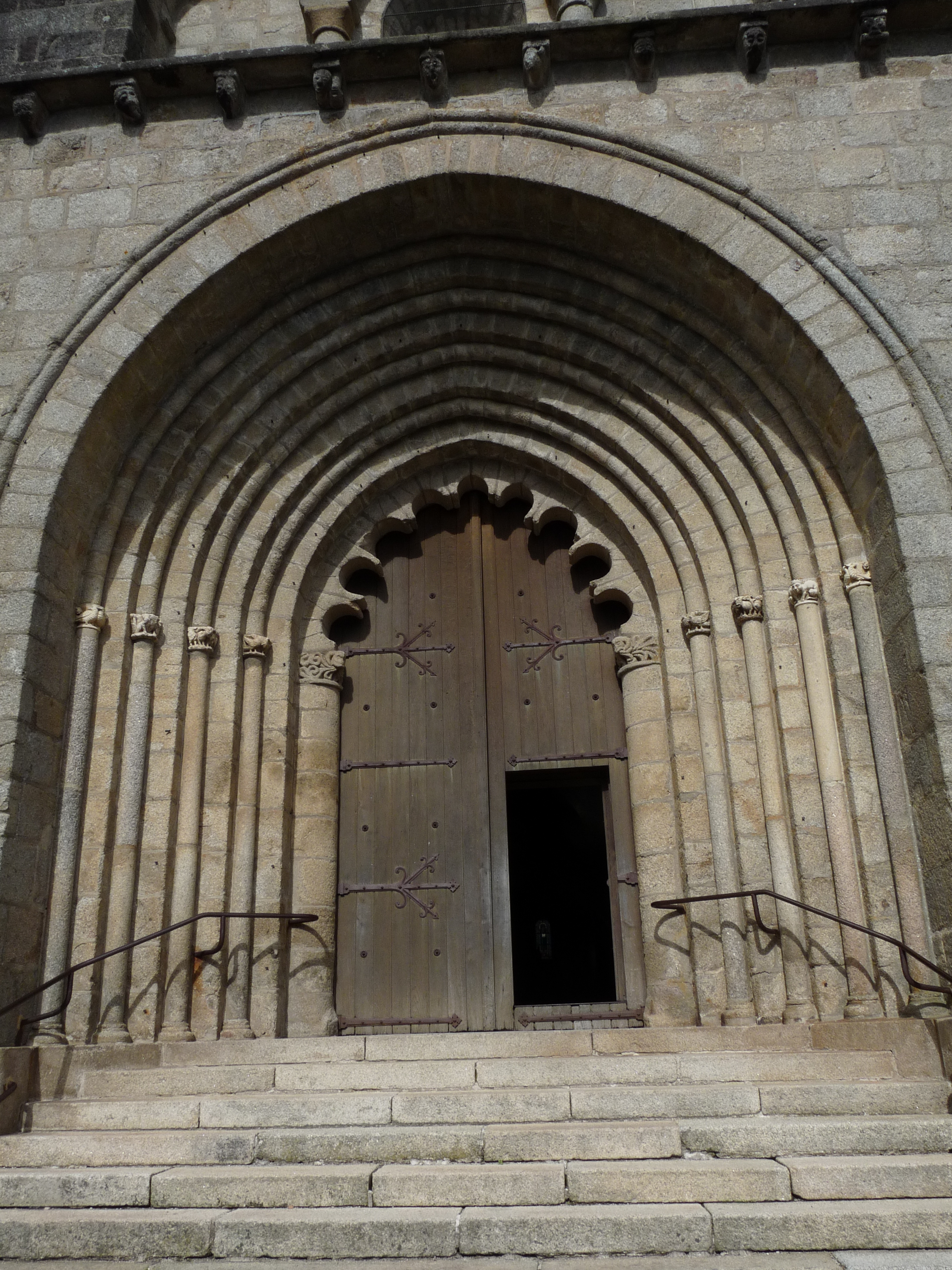 Portail de l'église abbatiale Saint-Bartélémy de Bénévent-l'Abbaye en Creuse